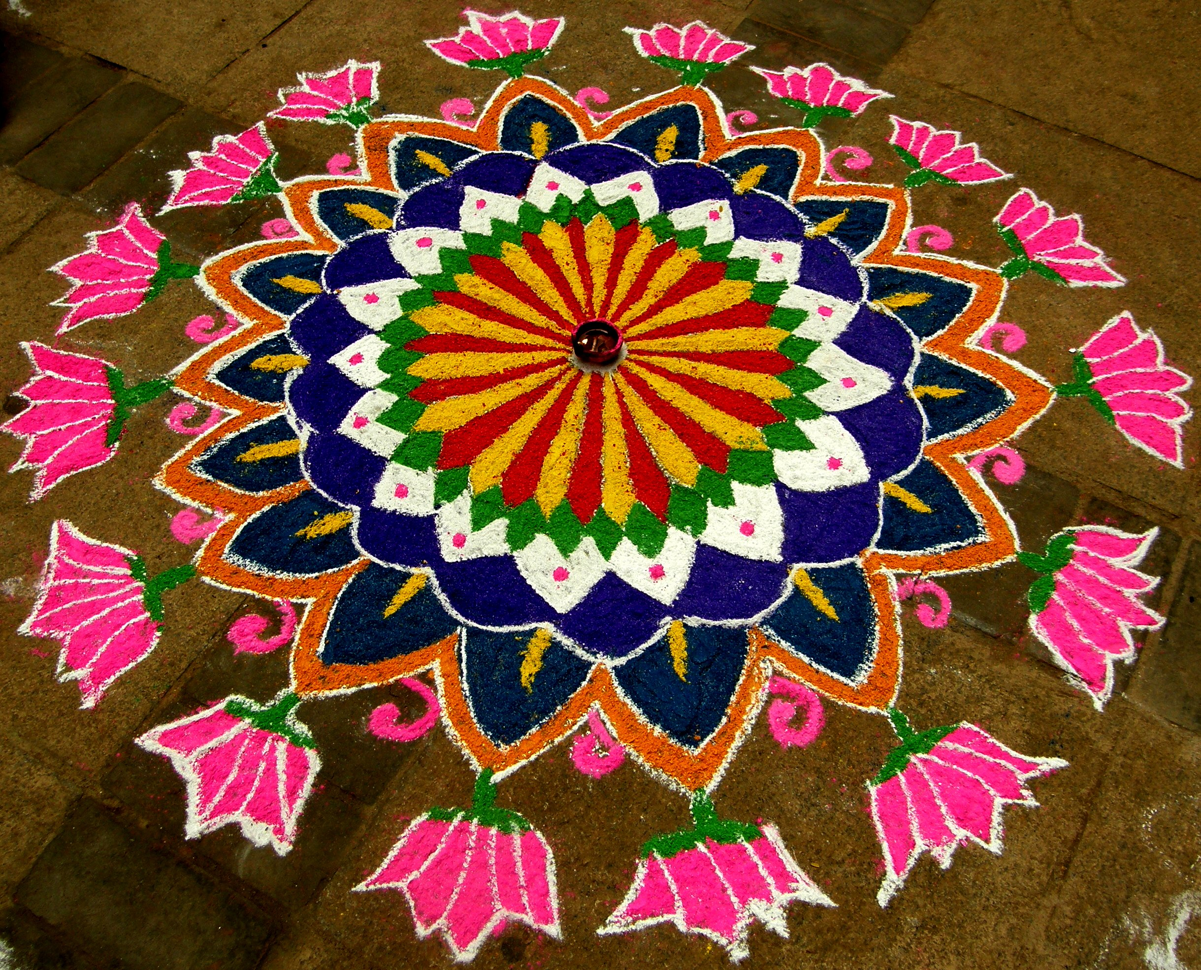 Rangoli,kolam,chennai,Tamil Nadu